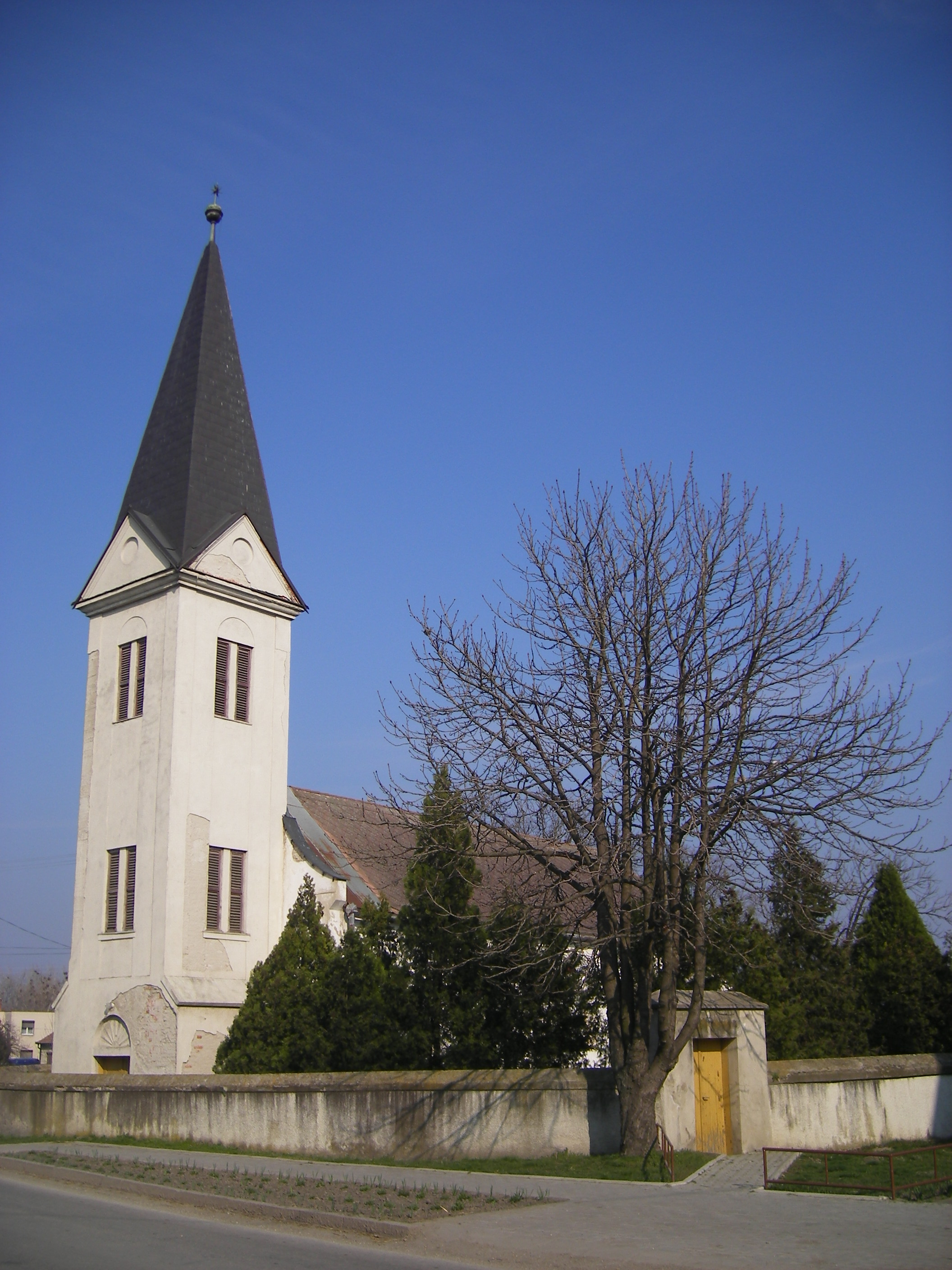 Lakszakállas, református templom